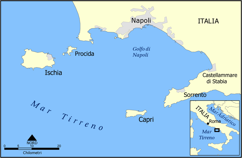 Ricavata dalla versione inglese